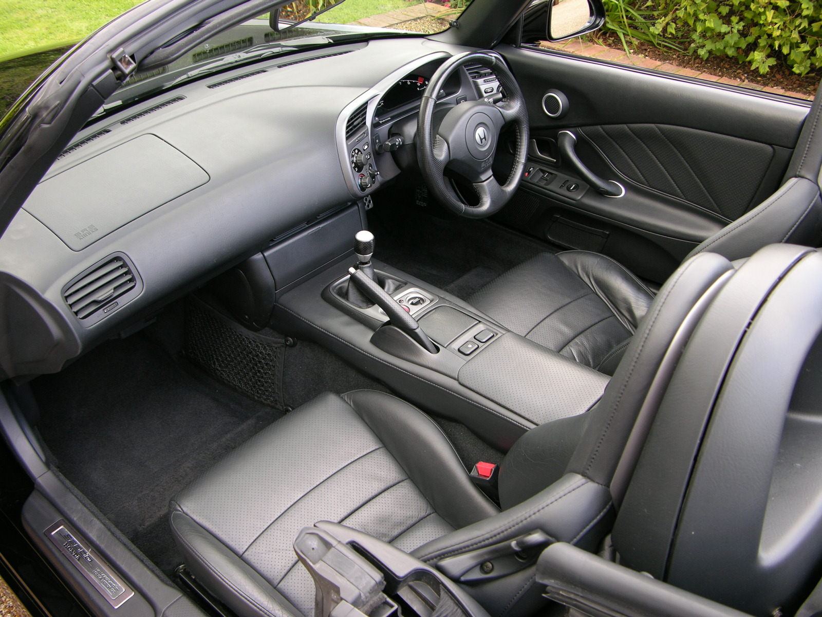 Honda S2000